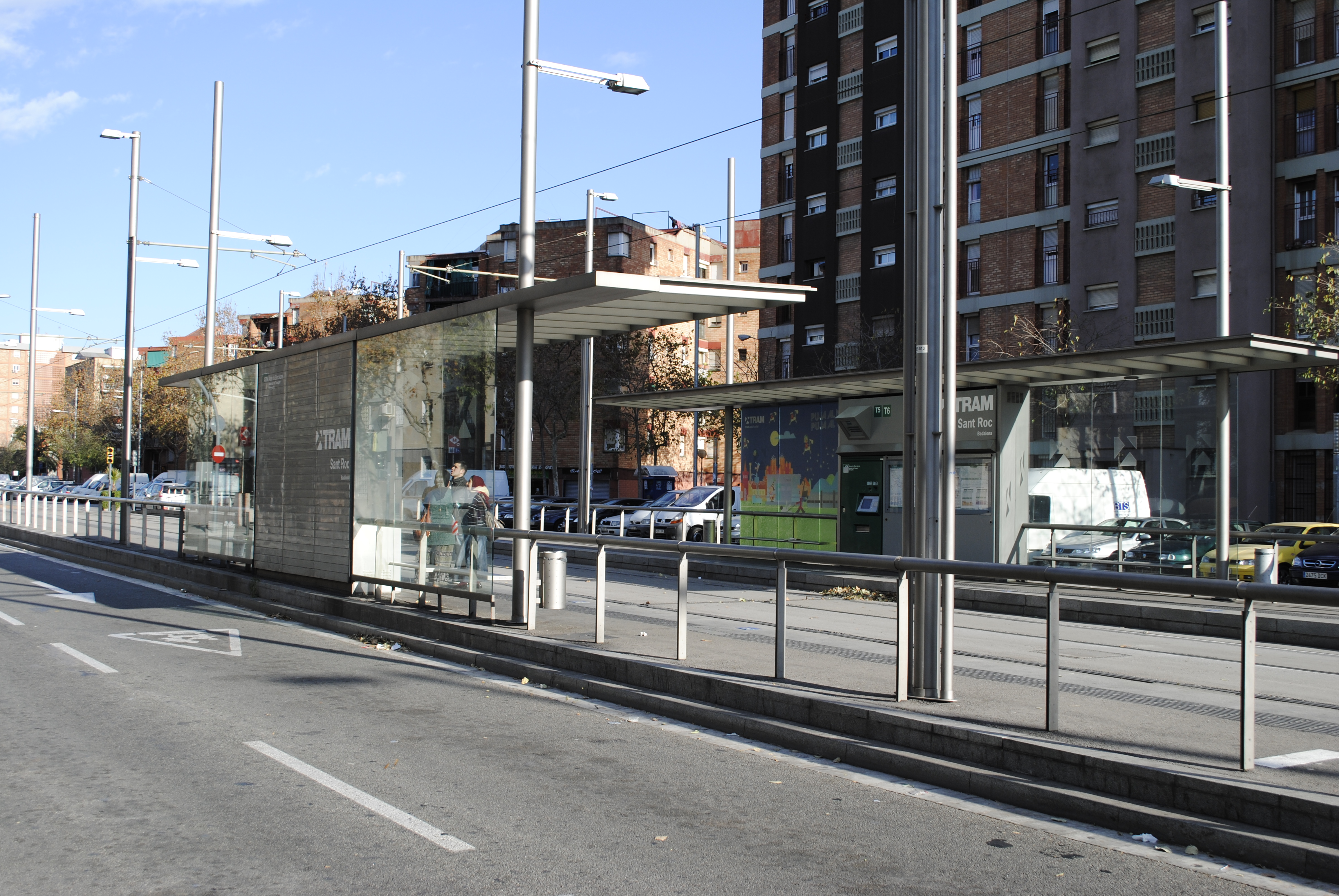 Parada de l'estació de Trambesòs Sant Roc